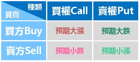 選擇權簡介。